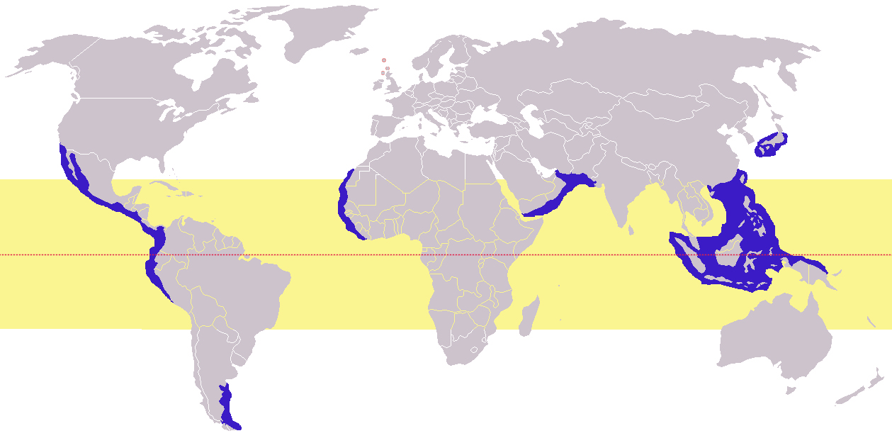 Phalaropus lobatus wintering